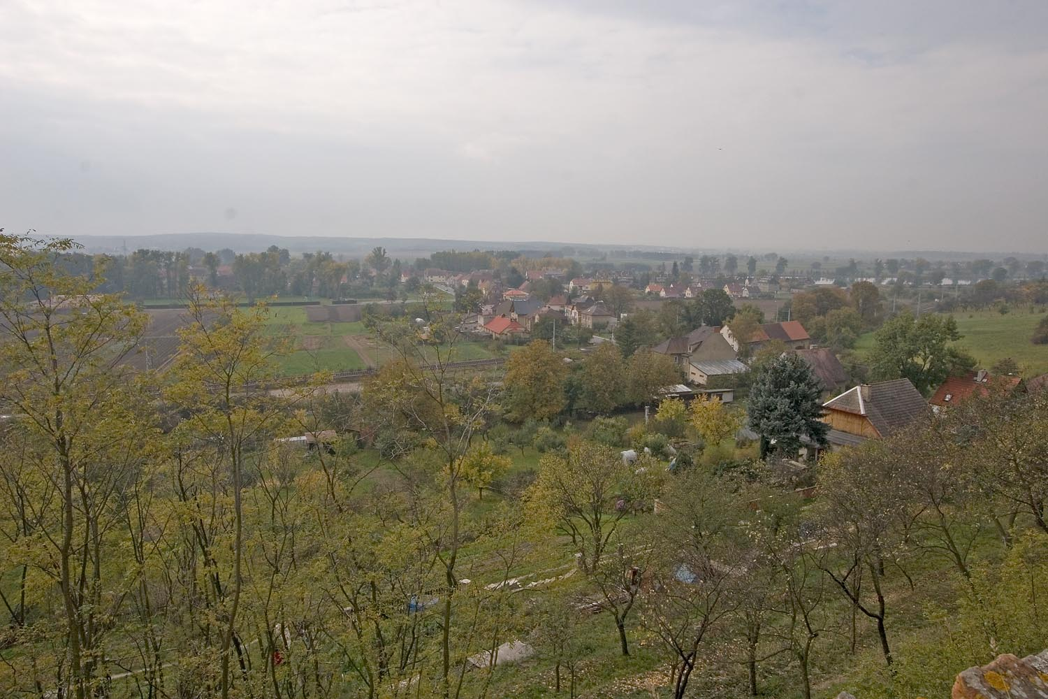 pohled na Křešice od kostela Nejsvětější Trojice u Záhořan